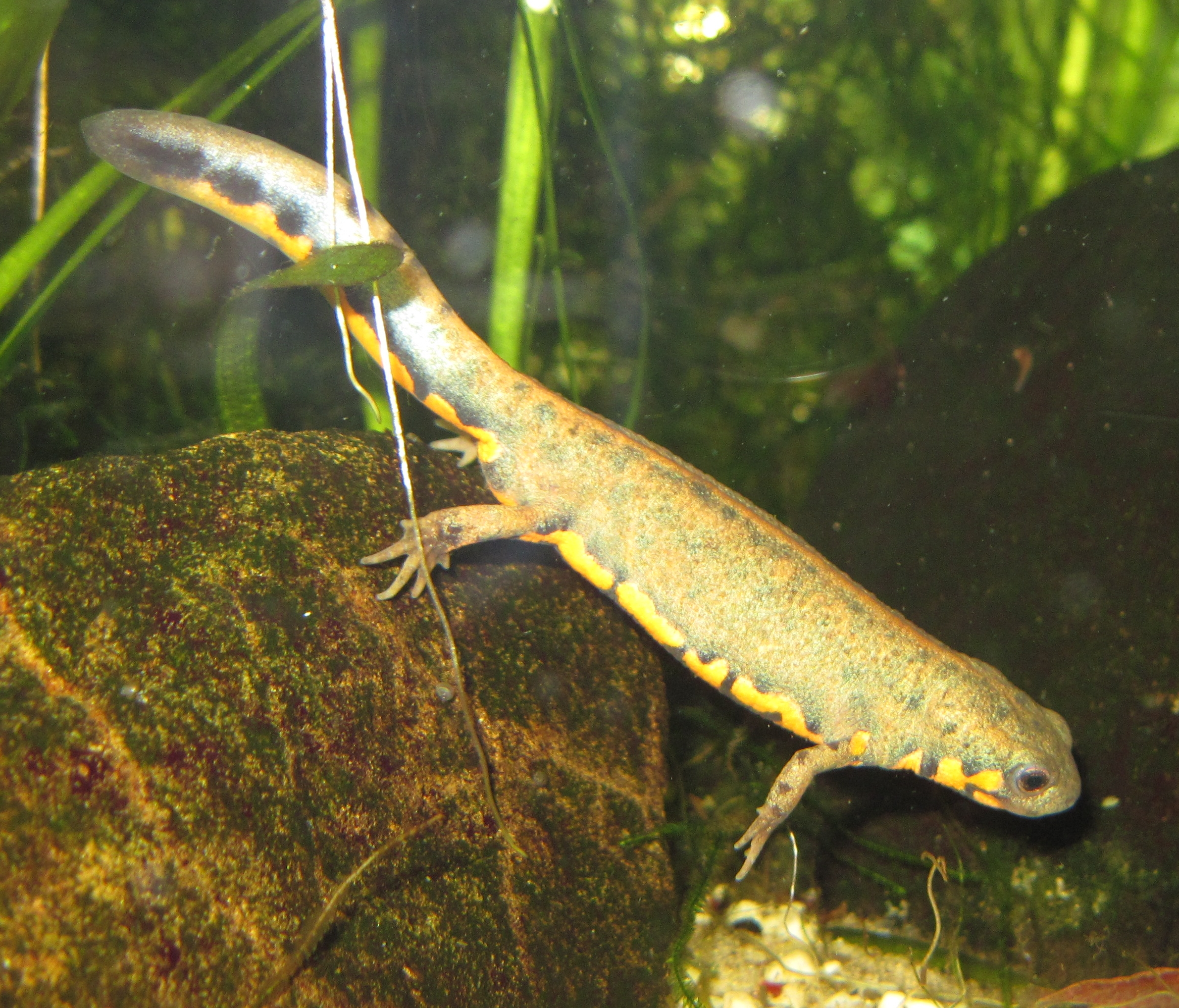 Hypselotriton cyanurus yunnanensis, Männchen.